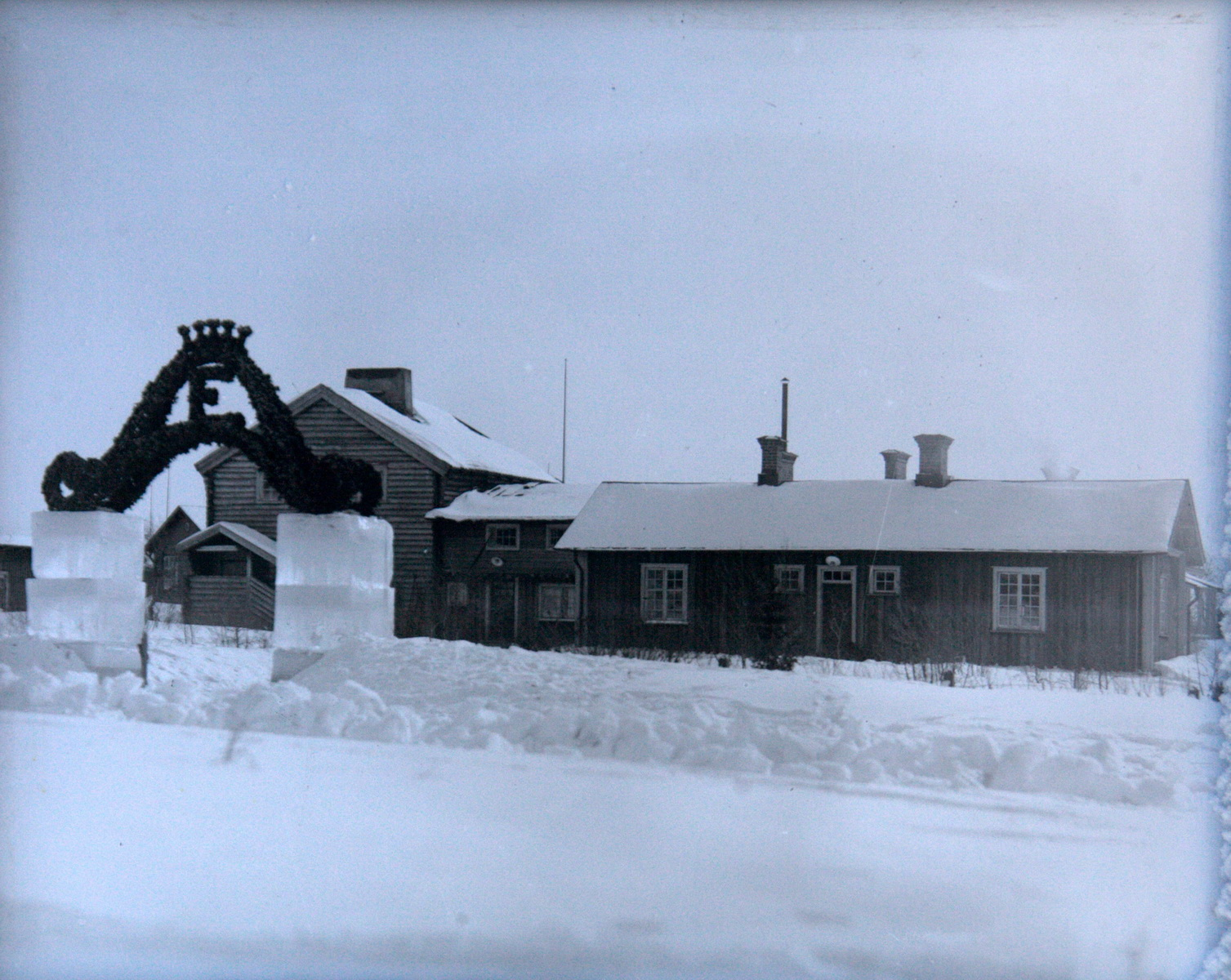 Hjalmar Lundbohmsgården amb un arc triomfal fet amb gel i fulles per a celebrar la visita del príncep Eugeni el 1912 quan va anar a Kiruna a pintar el retaule de l'església parroquial